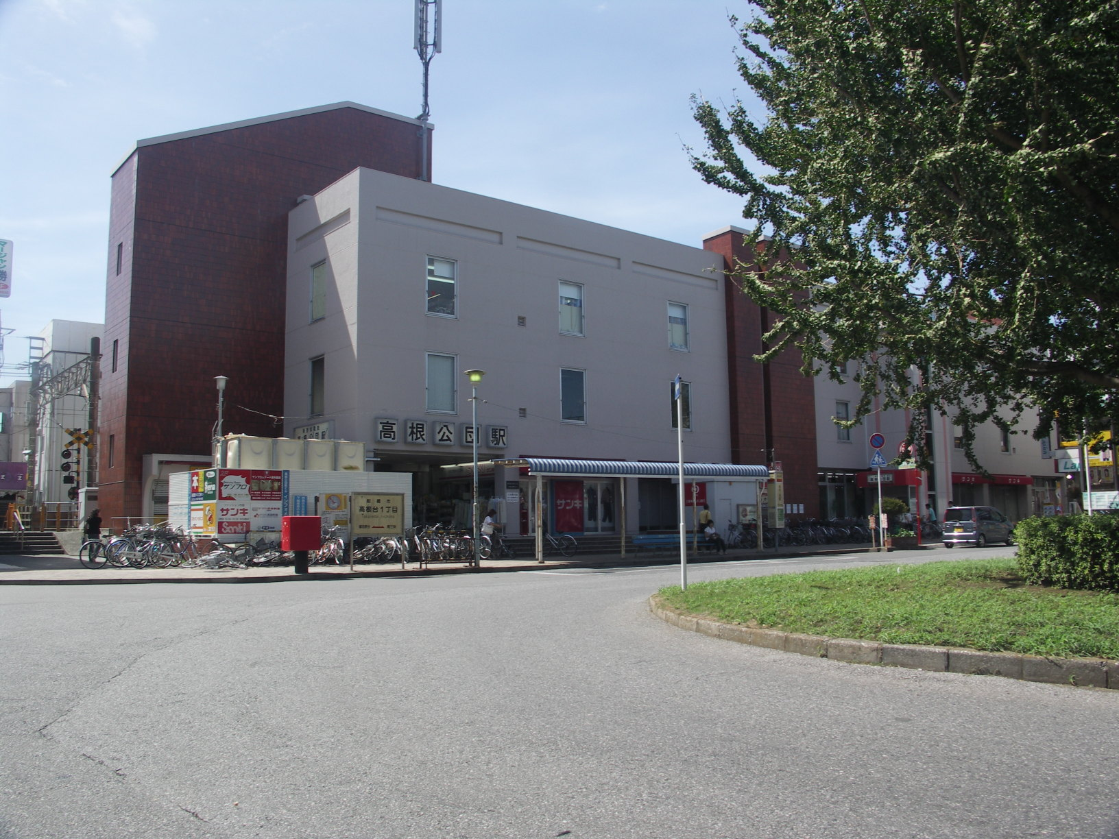 Takane-Kodan station, Shin-Keisei Line, Chiba, Japan, 高根公団駅